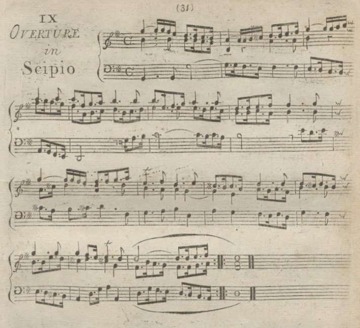 Scipione: Beginn der Ouvertüre. Druck von John Walsh, London 1760 in: Handel’s overtures from all his operas and oratorios. Set for the harpsicord or organ.